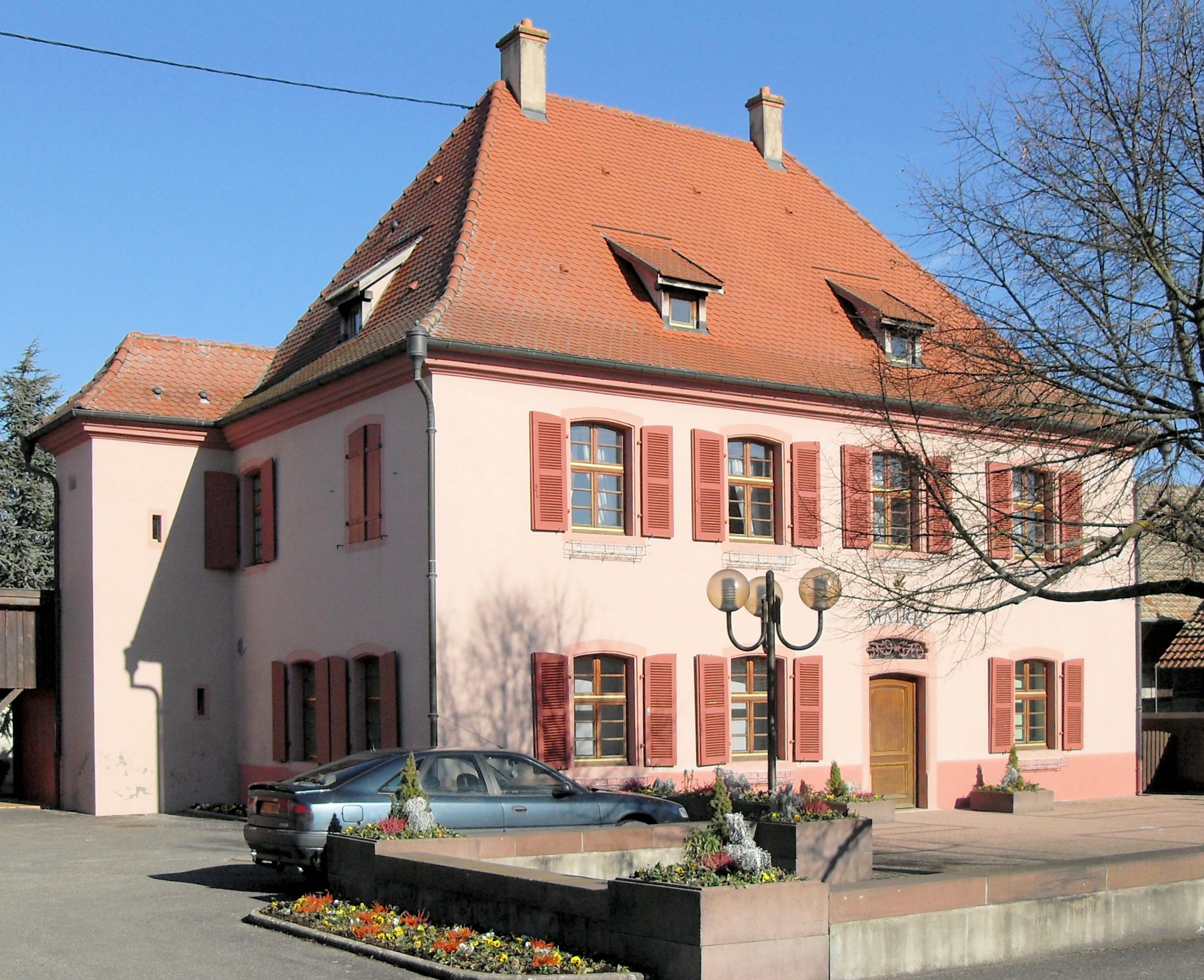 La mairie de Rumersheim-le-Haut